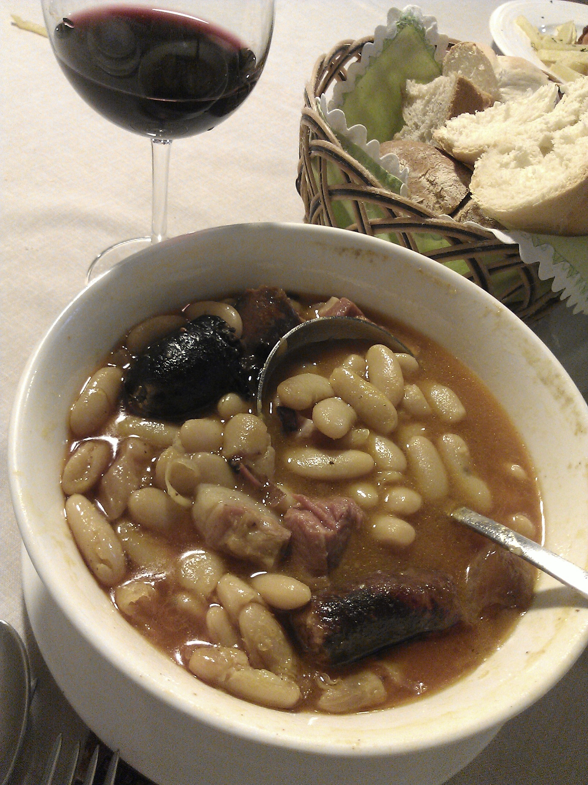 Fabada servida en el restaurante Llar de Viri, poseedora del premio a la mejor fabada del año 2013